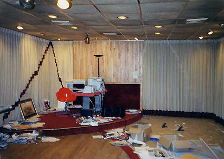 En 1985